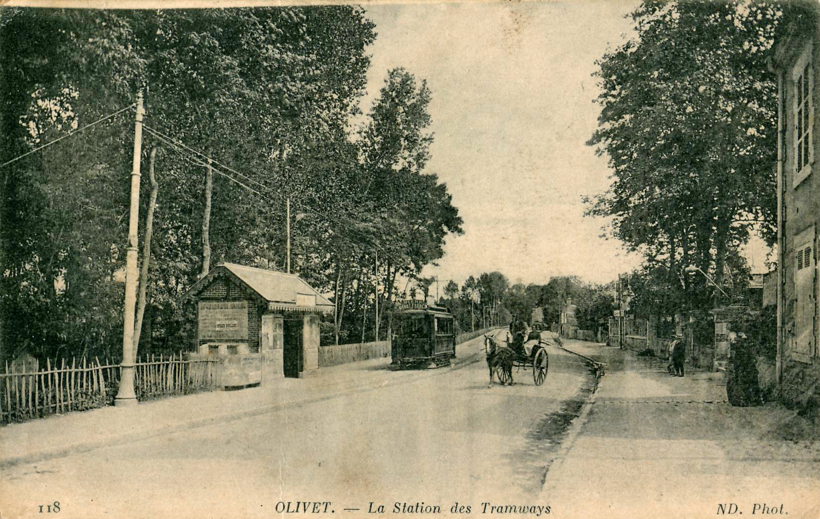 Carte postale ancienne éditée par ND, n°118 : OLIVET - La station des Tramways